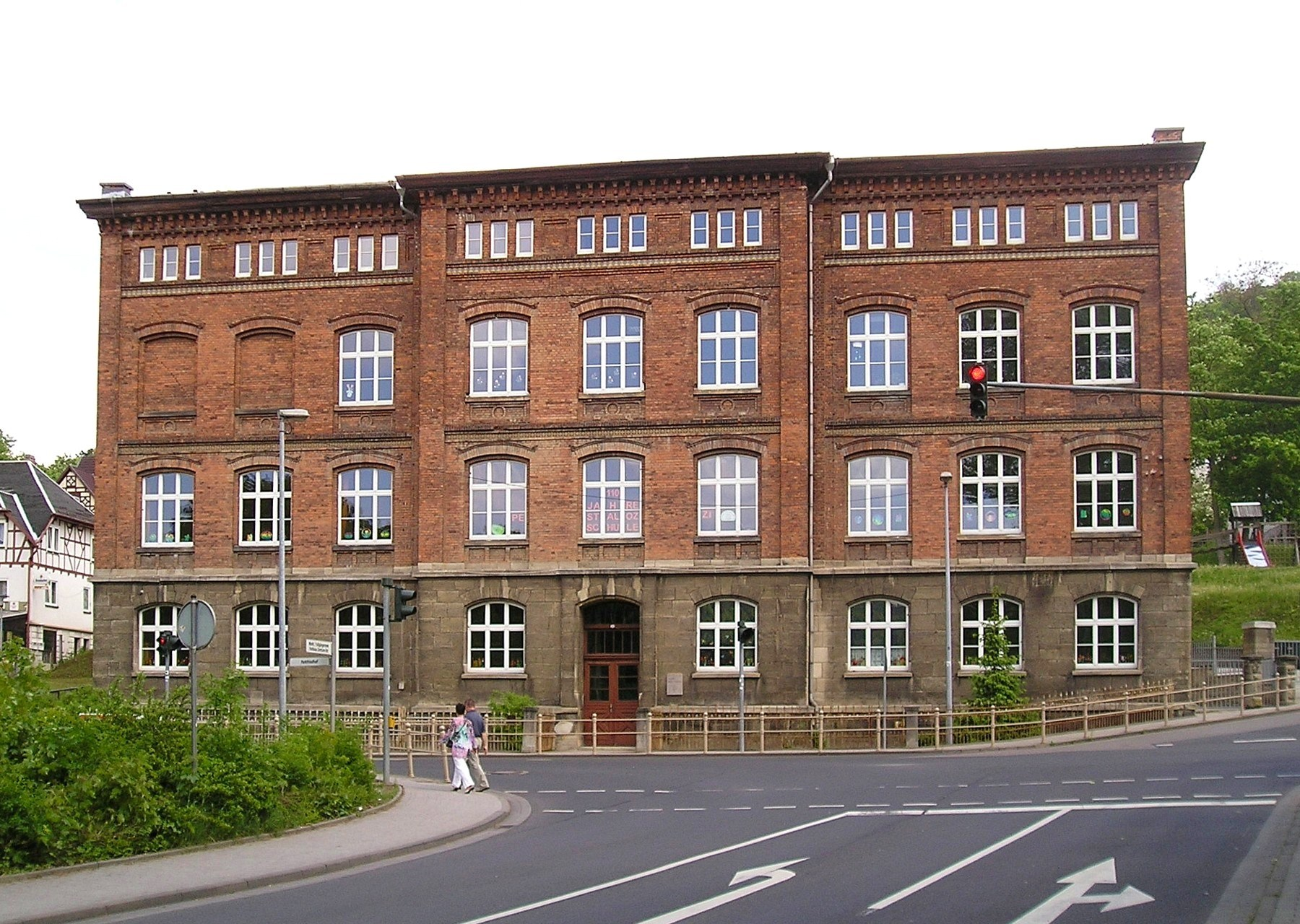 Ehemaliges Realgymnasium in Meiningen, später Polytechnische Oberschule „Friedrich Schiller“ und Förderschule, seit 2012 Evangelisches Gymnasium Meiningen.